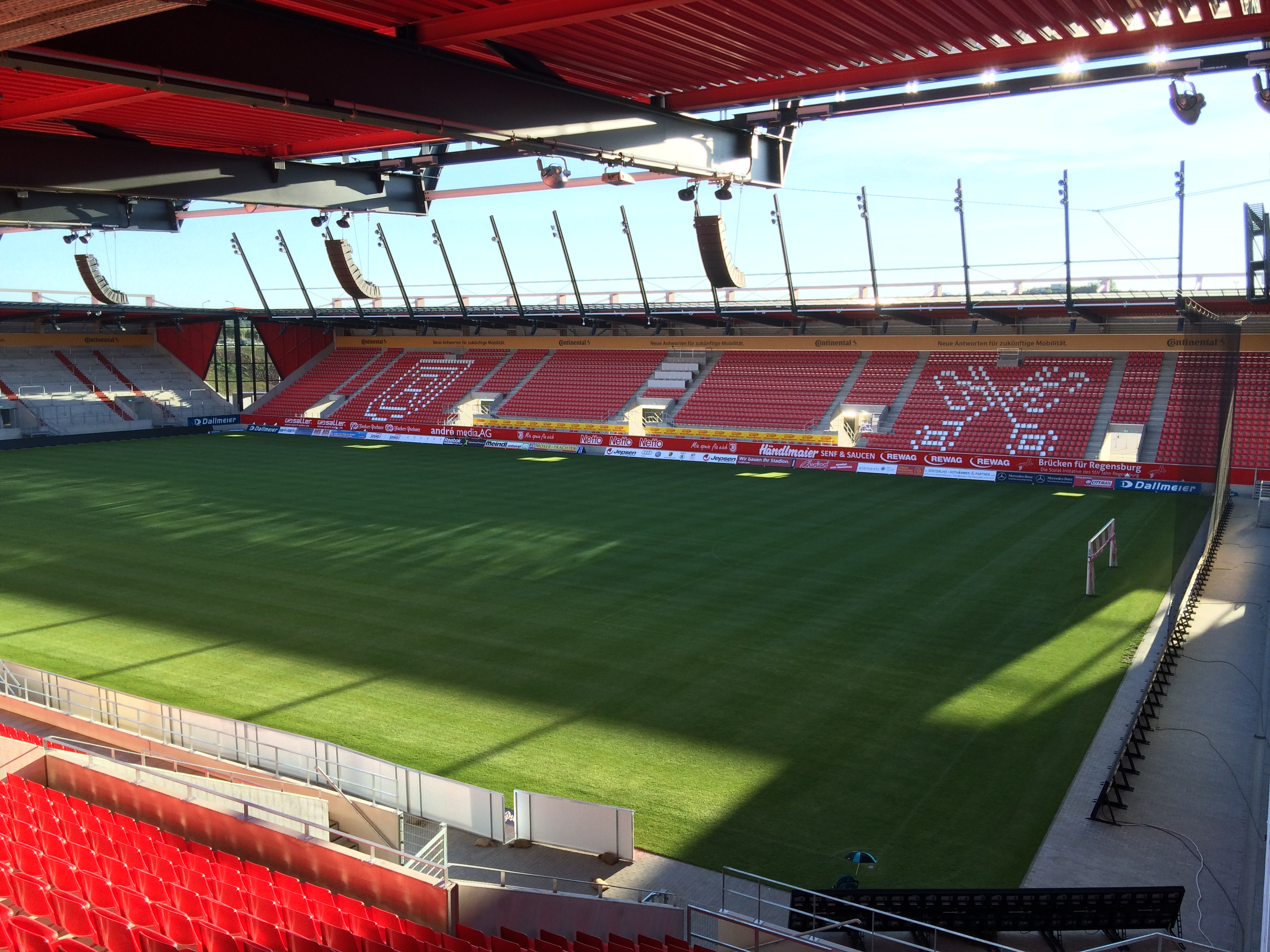 Ansicht der Westtribüne der Continental Arena